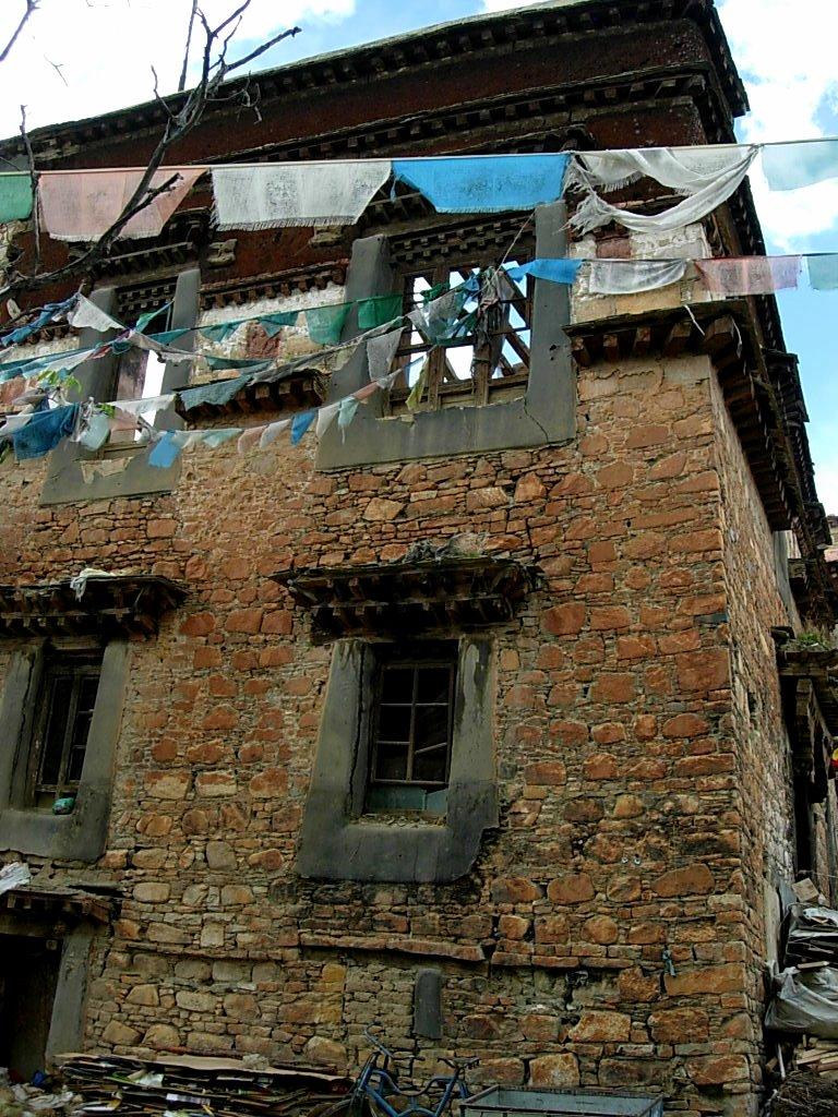 席德扎仓废墟